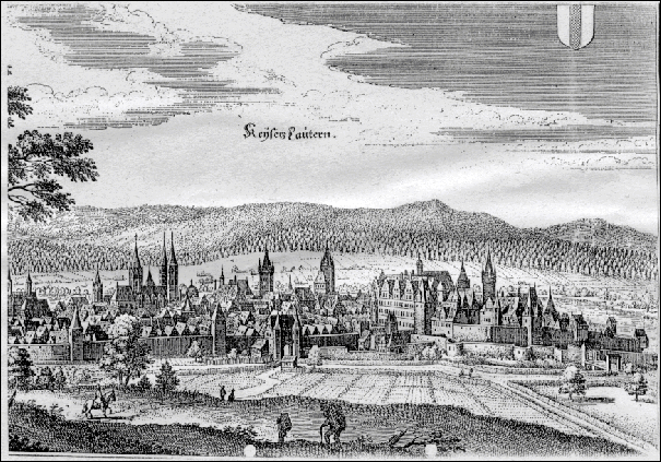 Kaiserslautern, Kupferstich nach Merian